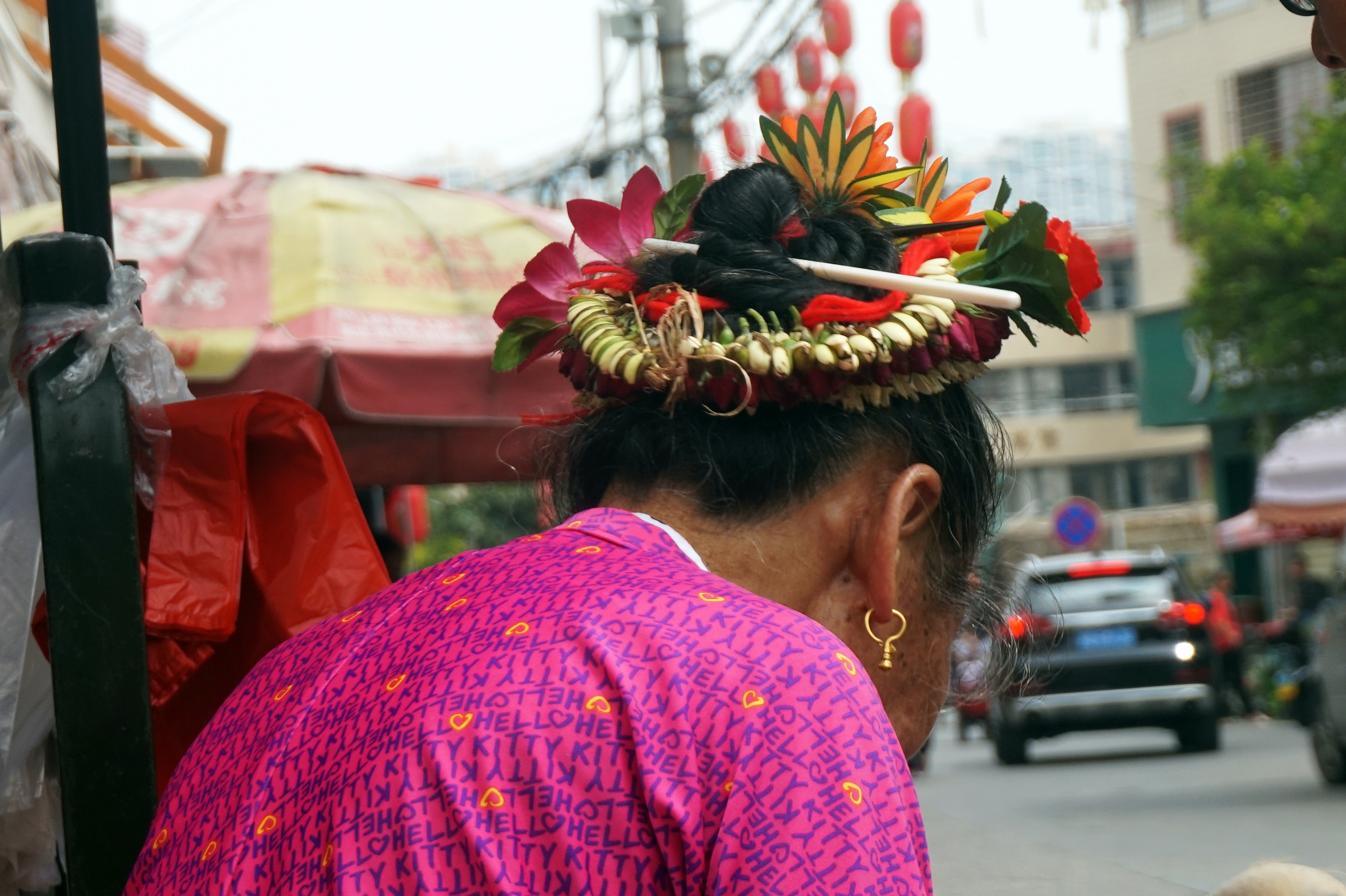 泉州蟳埔女“簪花围”。